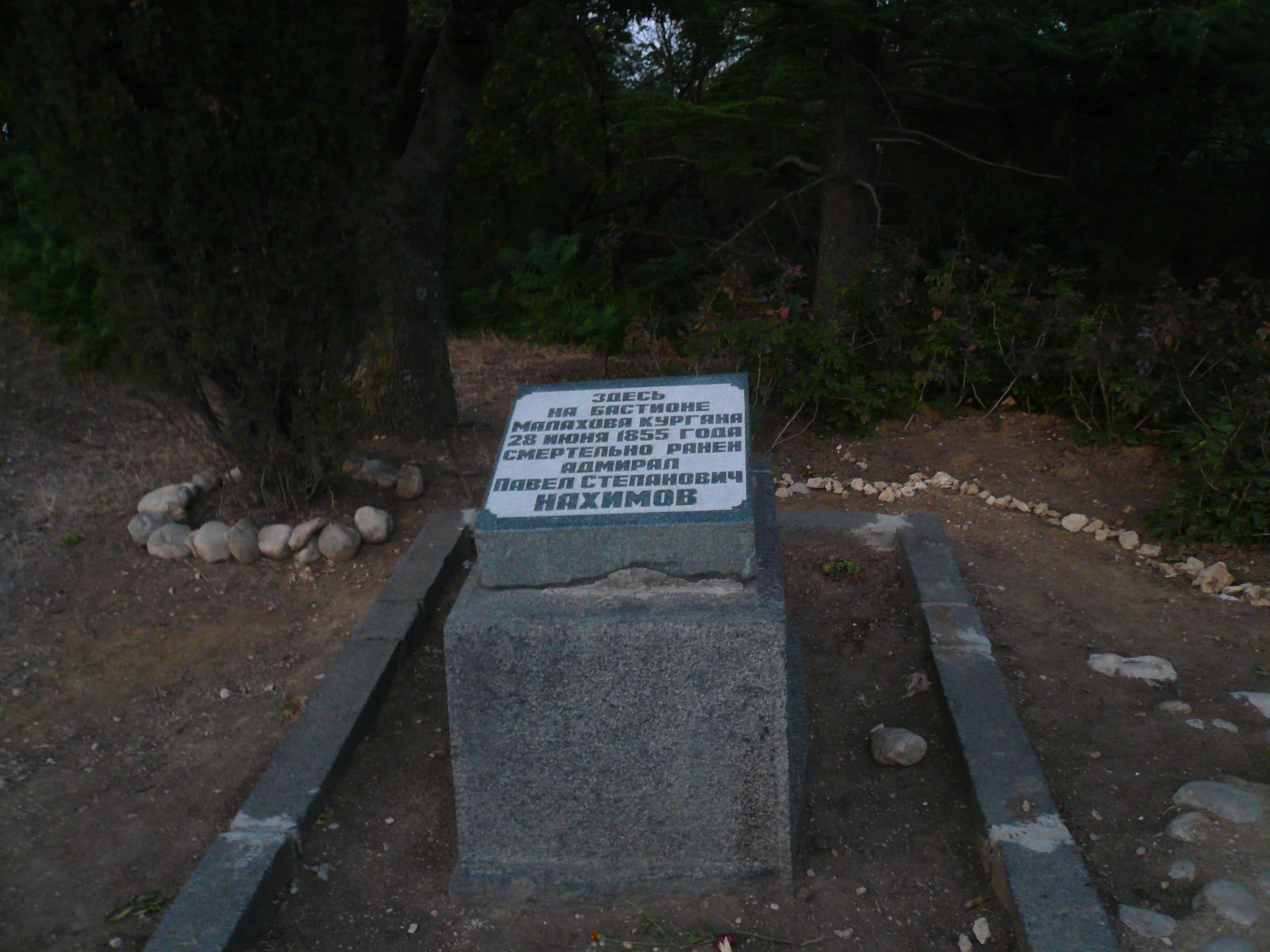 Памятная доска на месте гибели адмирала Нахимова